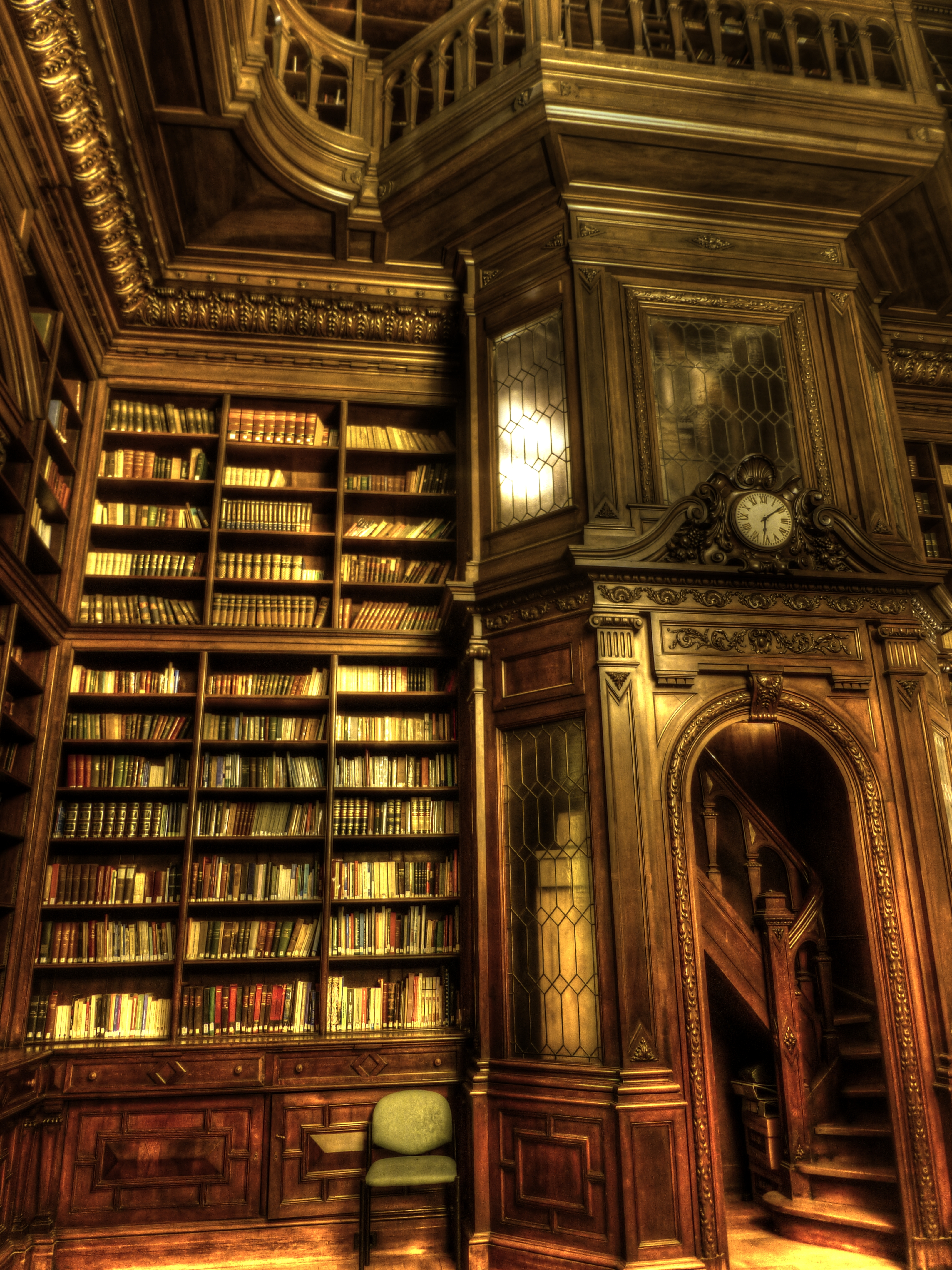 Biblioteca Pública Esteban Echeverría. Legislatura de la ciudad de Buenos Aires. Argentina